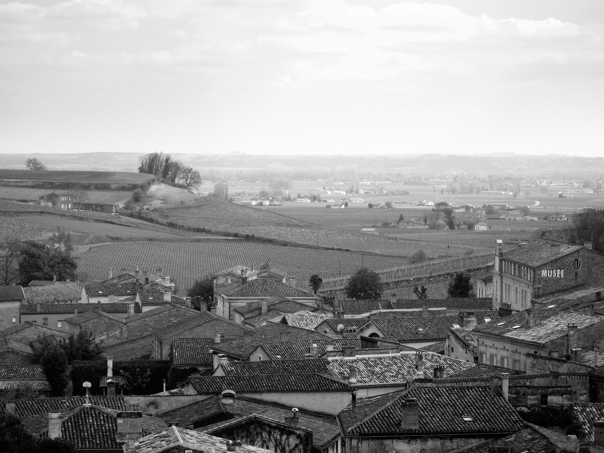 Saint-Emilion.